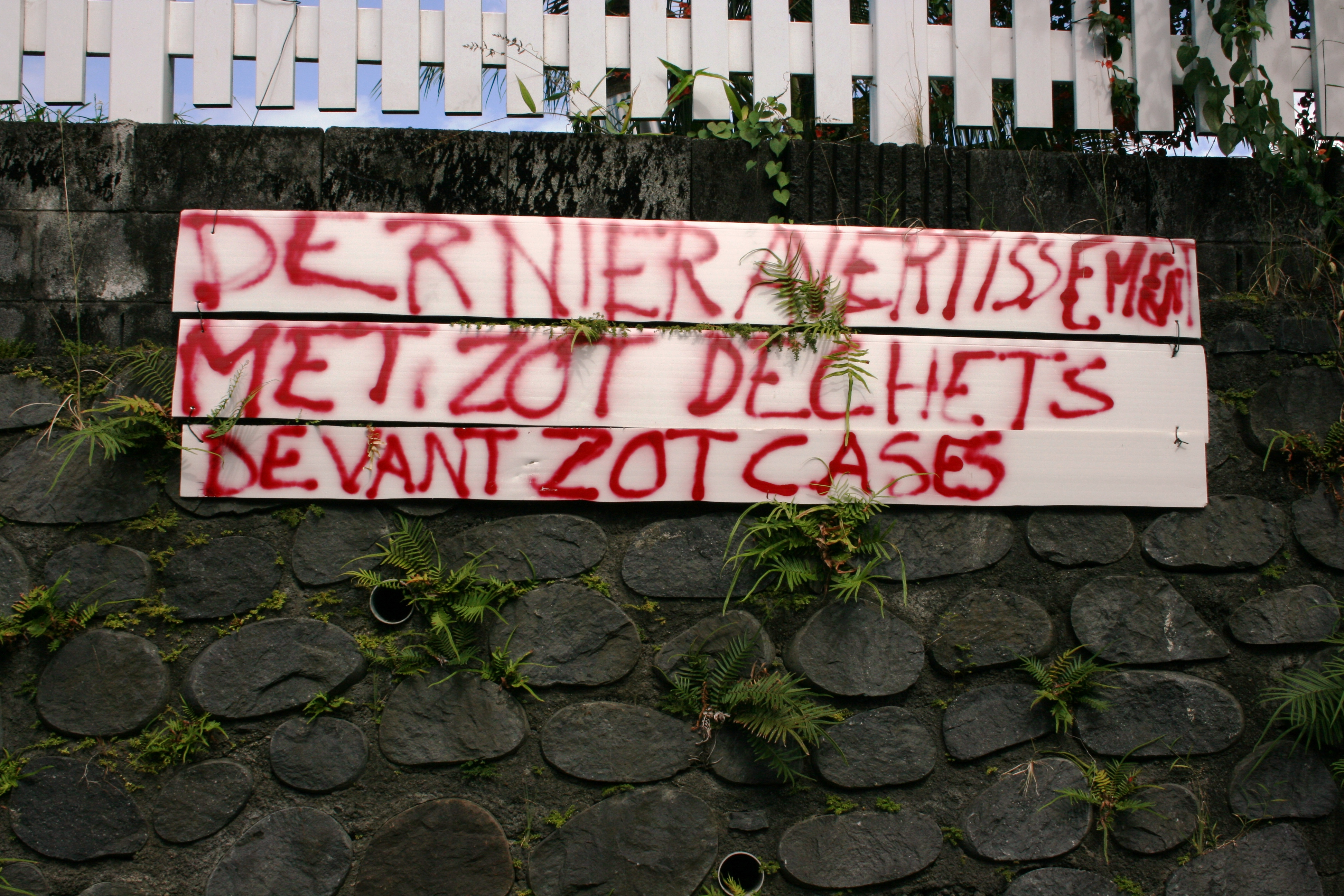 Message en créole réunionnais à Saint-André de La Réunion.